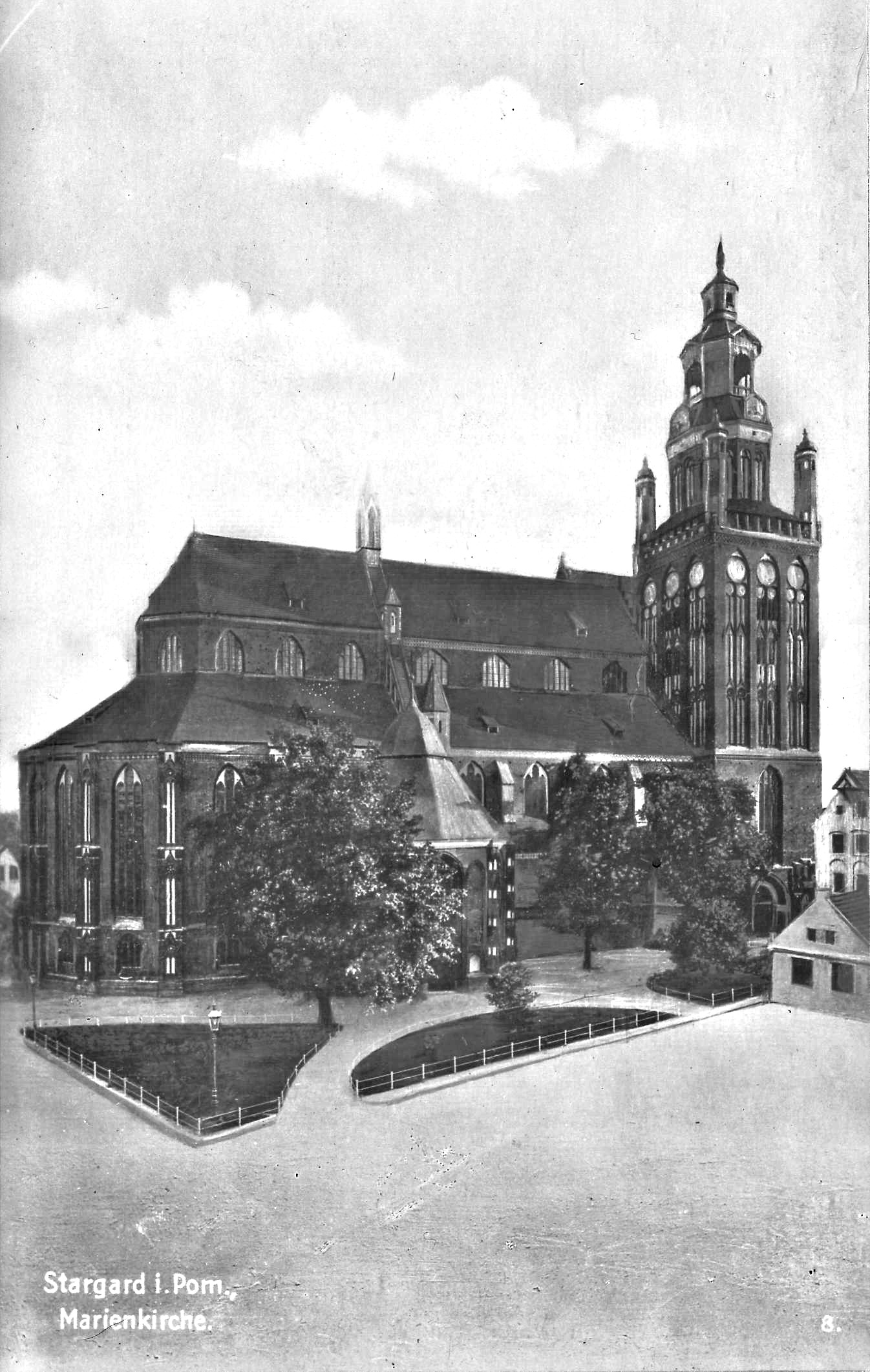 Marienkirche in Stargard Szczeciński, Poland